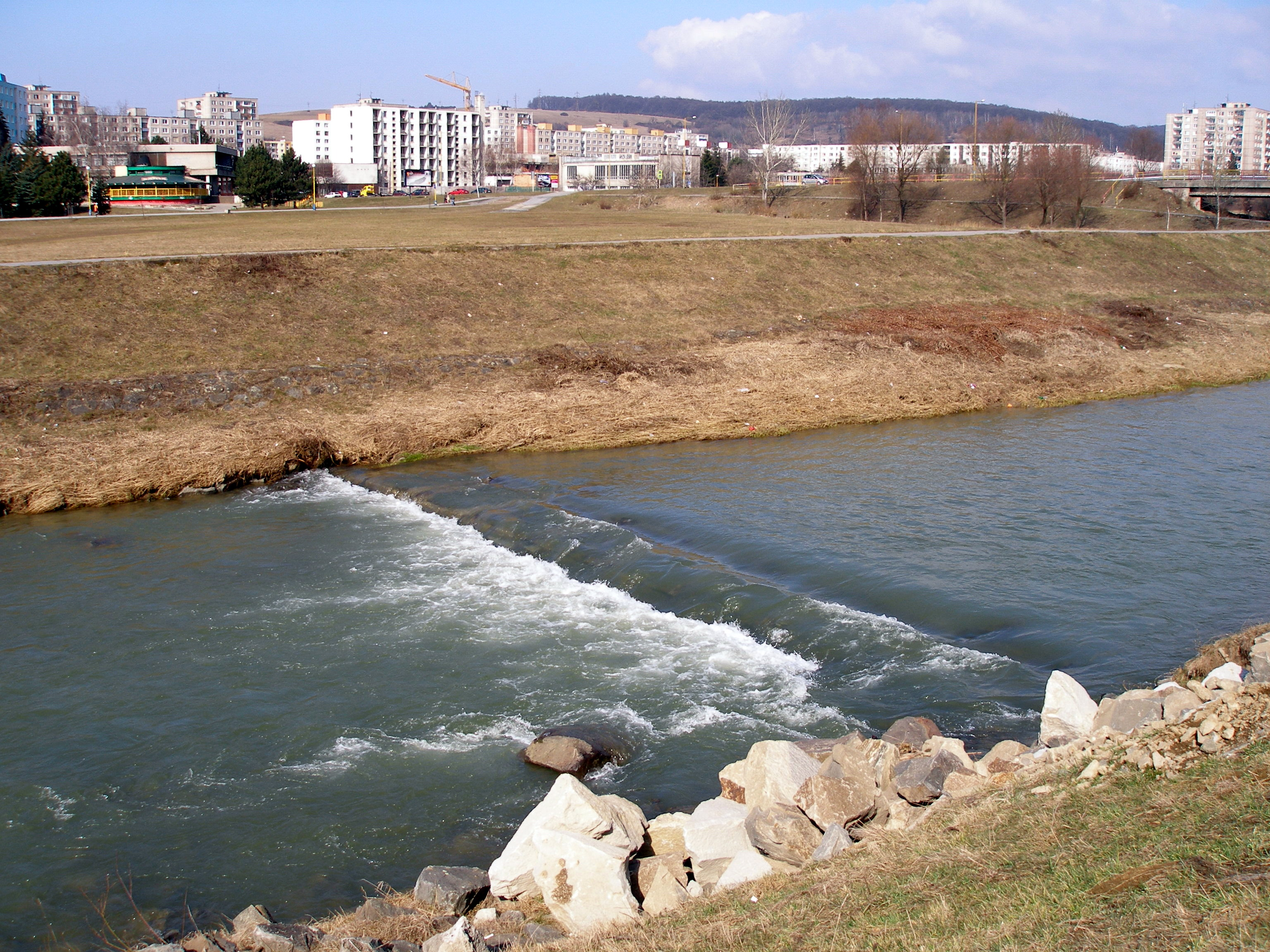 Sídlisko III v meste Prešov a rieka Torysa, Mukačevská ulica, Jazdecká ulica A.Prídavka.